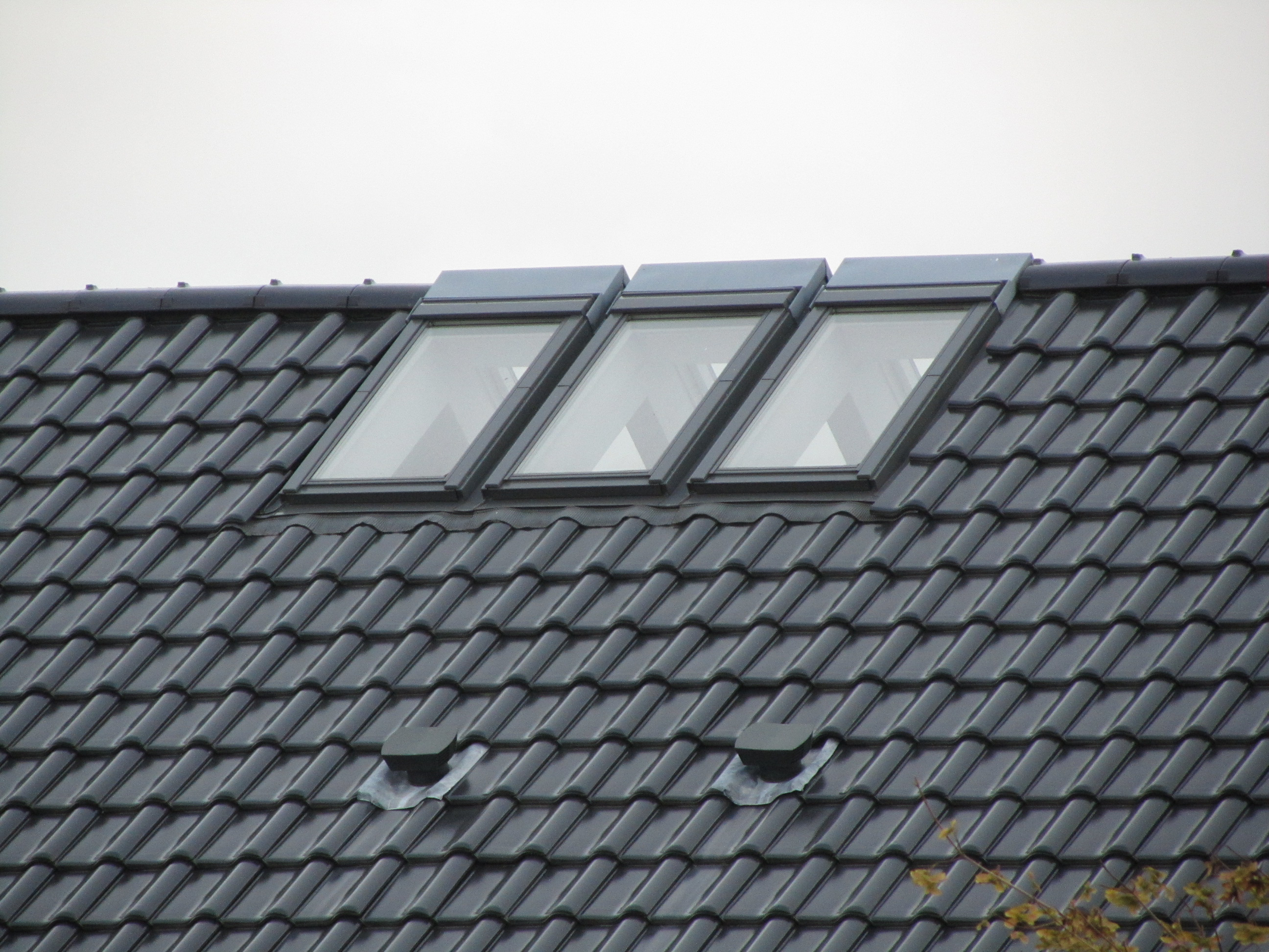 Dachfenster, Syke Baugebiet Sulinger Straße